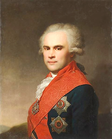 Попов, Василий Степанович (1745) Portrait of Vasili Stepanovich Popov (1743-1822)